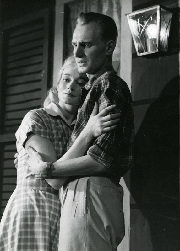 Ulla Smidje och Stig Gustavsson i Urladdningen på Helsingborgs stadsteater